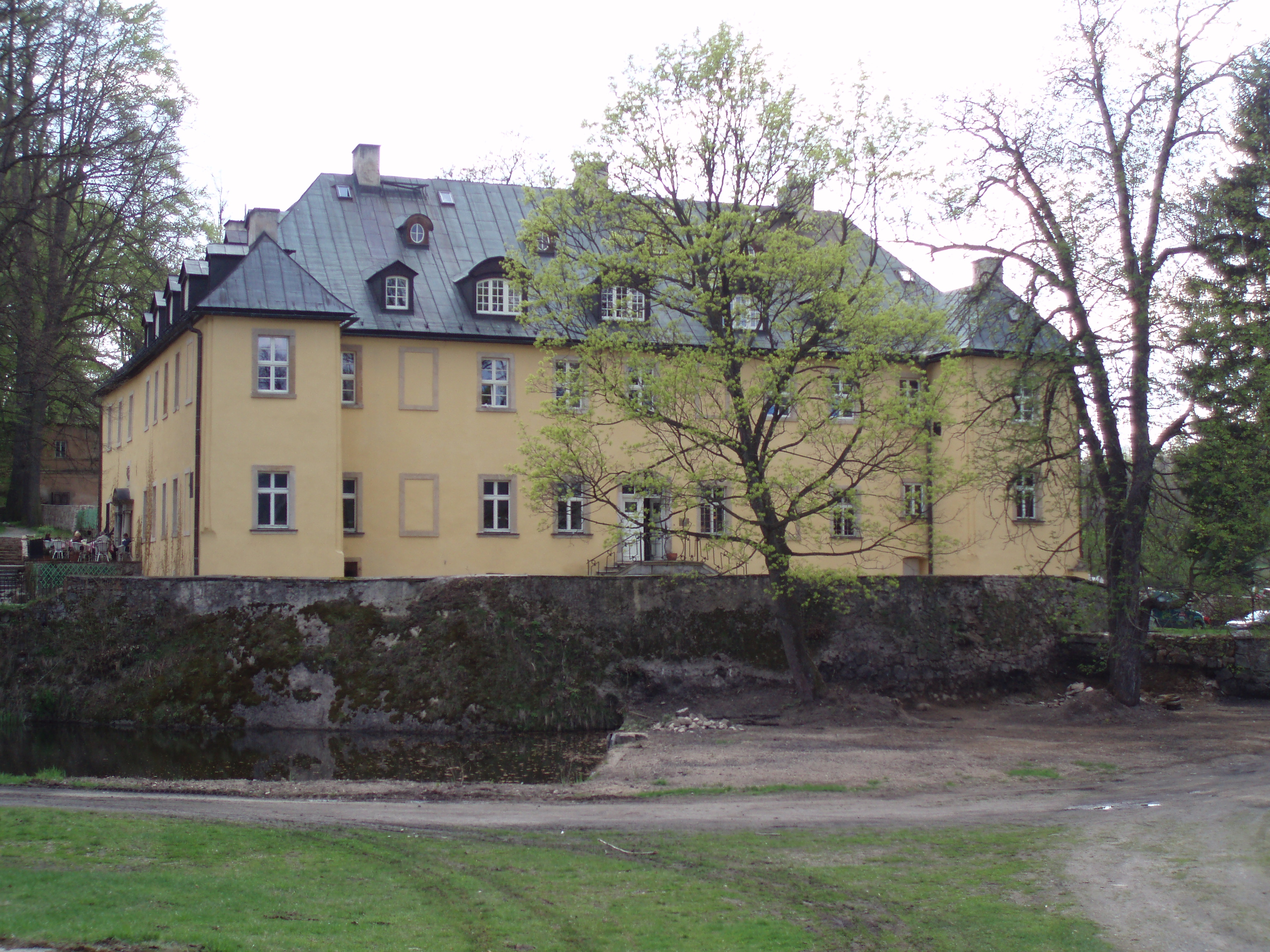 Staniszów 100 - Pałac z oranżerią, obecnie hotel z restauracją Chateau in Staniszów (Stonsdorf), Poland